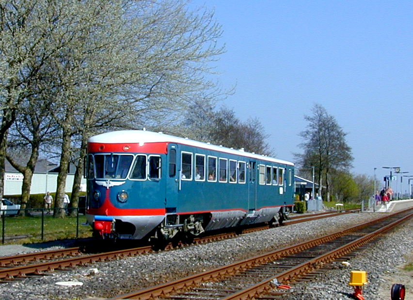 NS treinstel 41 van het type plan X te Dronrijp.